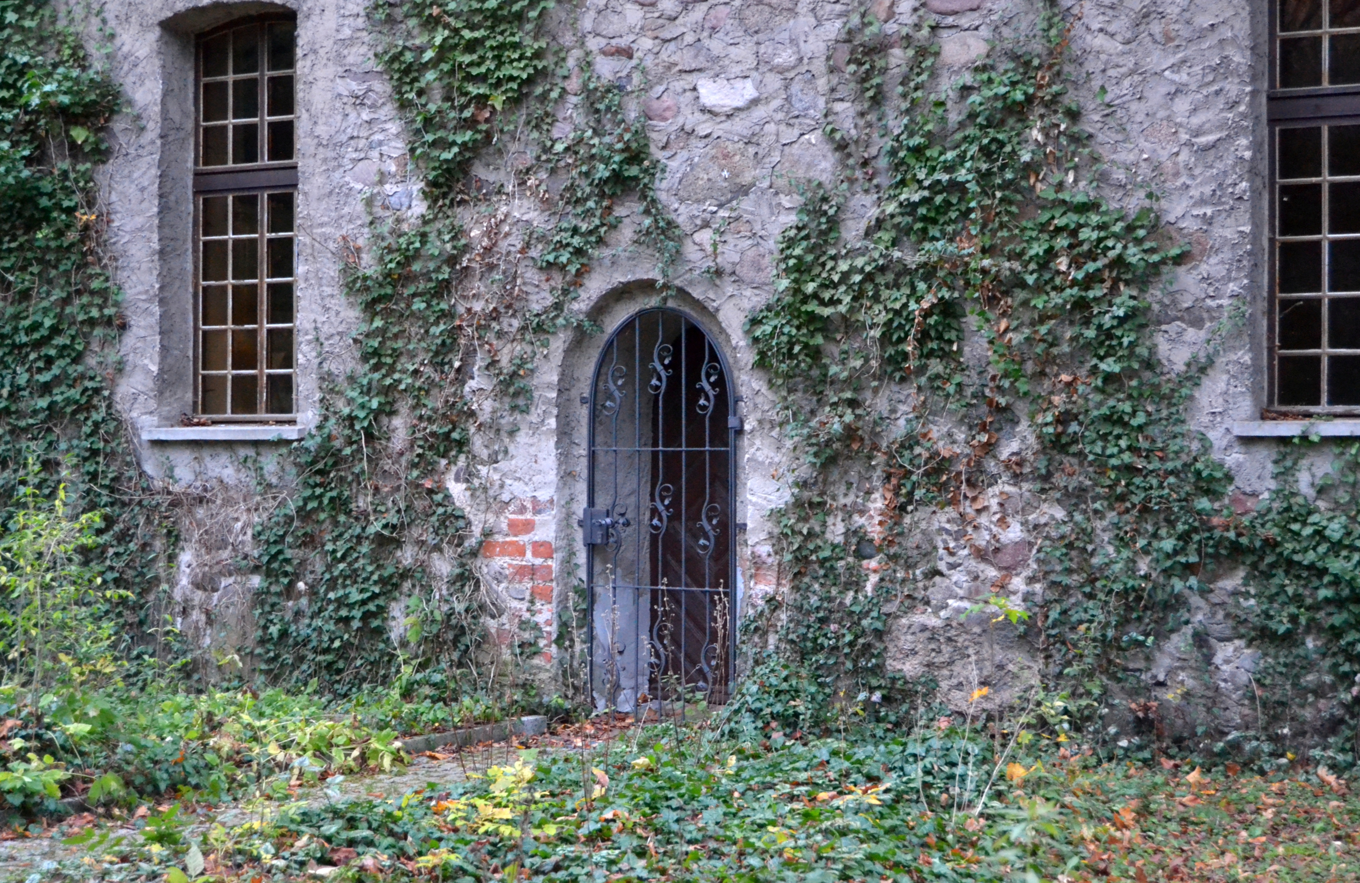 Dorfkirche und Kirchhof von Klein-Schönebeck (Schöneiche bei Berlin).